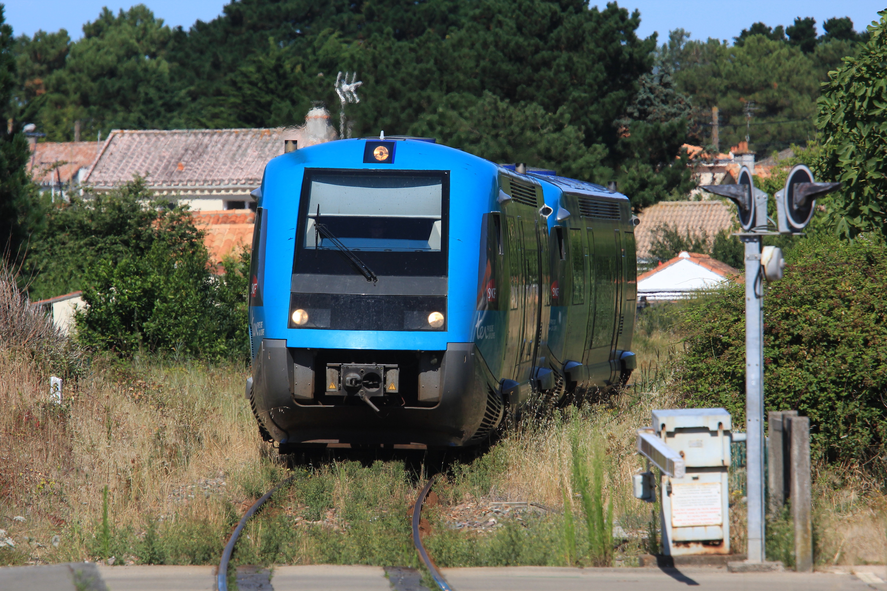 Deux « ATER » arrivent en gare des Moutiers-en-Retz, sur une course Pornic - Nantes. Notez l'état de la voie, complètement envahie par les herbes.